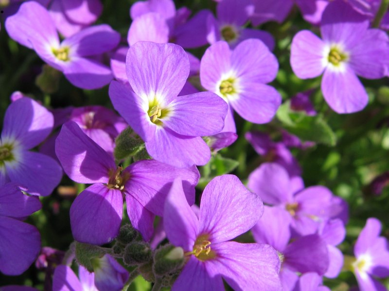 Blüte des griechischen Blaukissens Aubrieta deltoidea